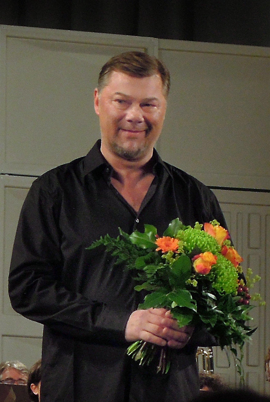 Der Sänger René Pape zu Gast bei der Dresdner Philharmonie